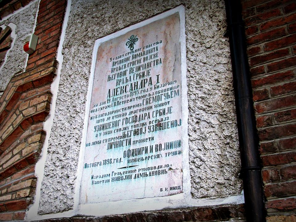 Srpski (latinica): Sićevačka klisura, Manastir Sv.Petka Iverica, spomen ploča